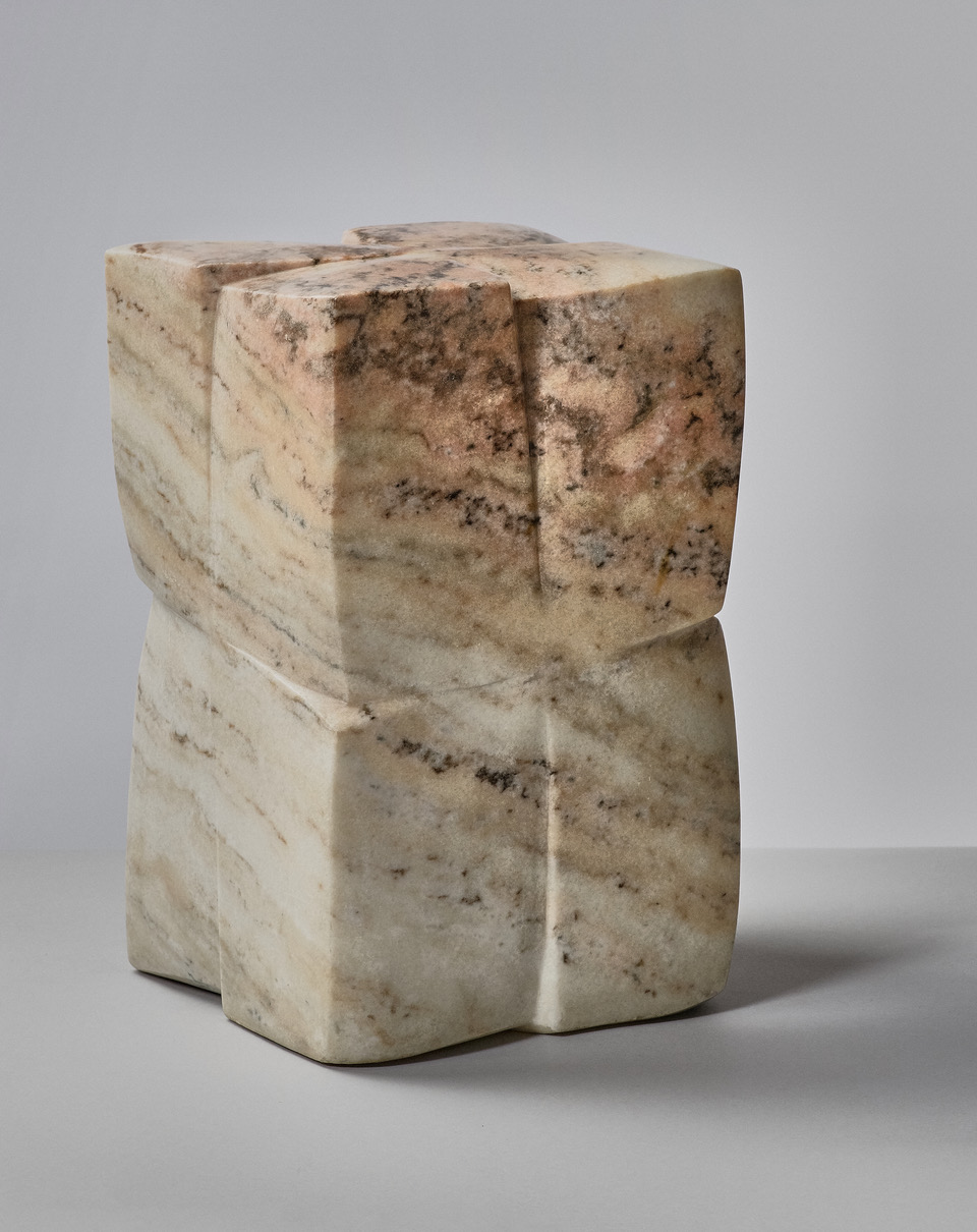 Magdalena Więcek, Dialog z kamieniem (XII), 1985, marmur, 40 x 24 x 25 cm